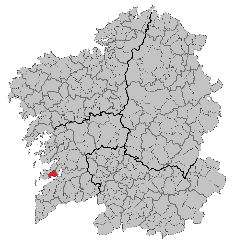 Mapa coa localización do concello de Moaña.